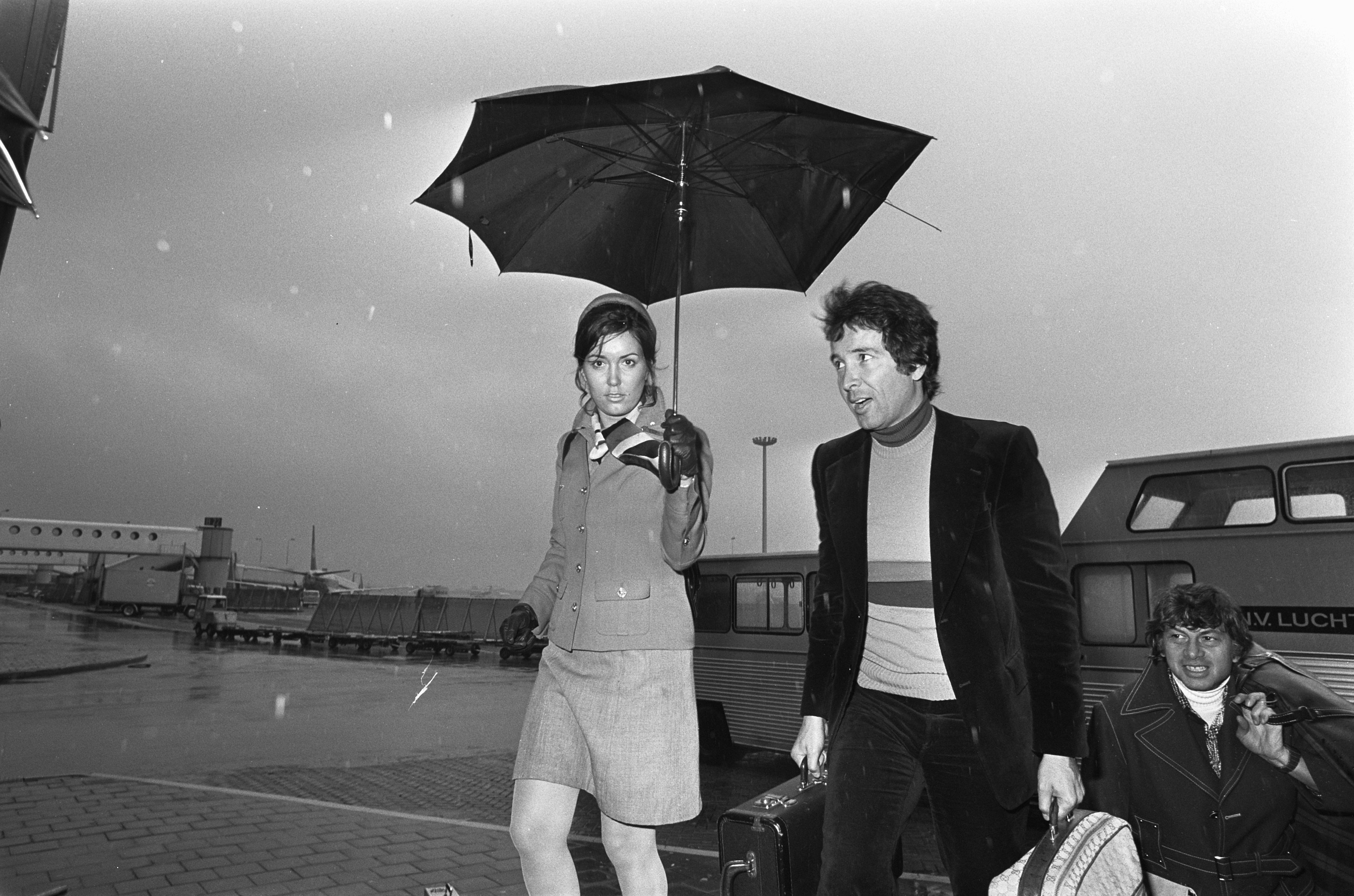 Herb Alpert en zijn band aangekomen op Schiphol; Herb Alpert onder paraplu na aankomst